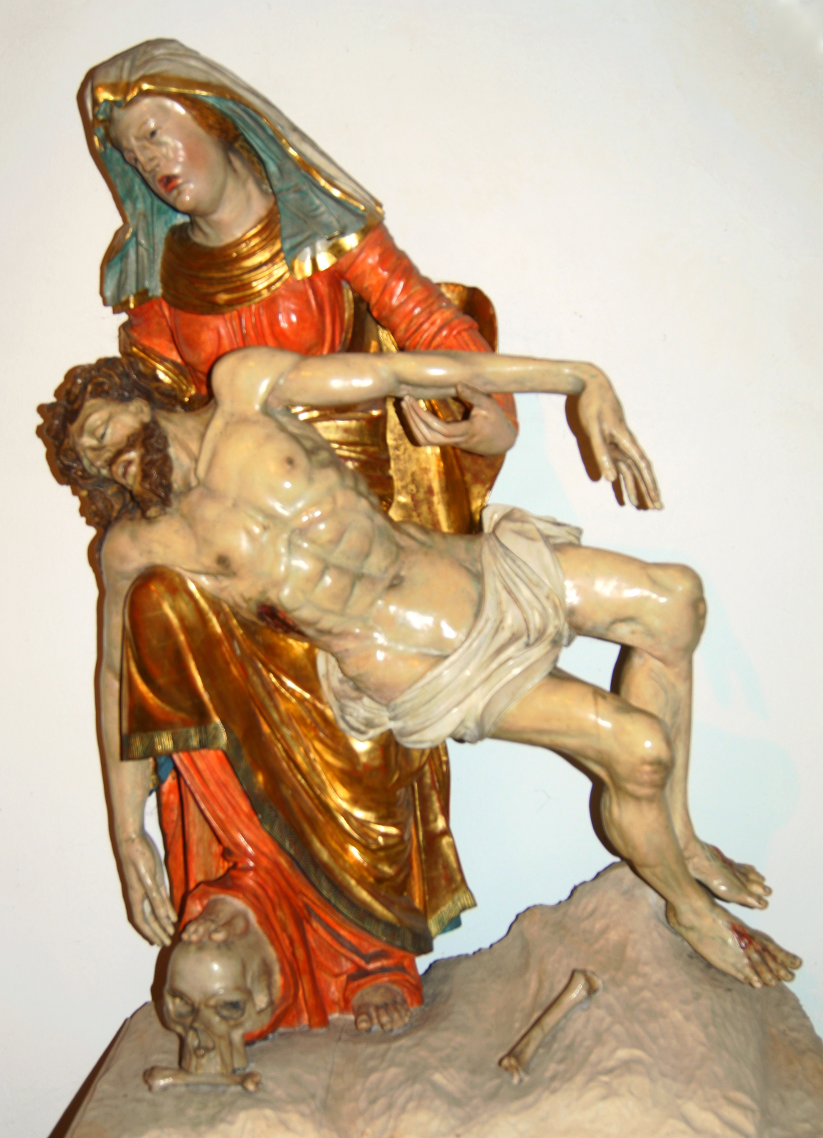 Pietà unter der Orgelbühne in der Klosterkirche St. Marien in Burlo. Weichholz, 18. Jahrhundert, rückseitig hohl. This is a photograph of an architectural monument. A1 - A 26